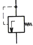 Sybole d'un limiteur de pression non-réglable, dit soupape de sécurité